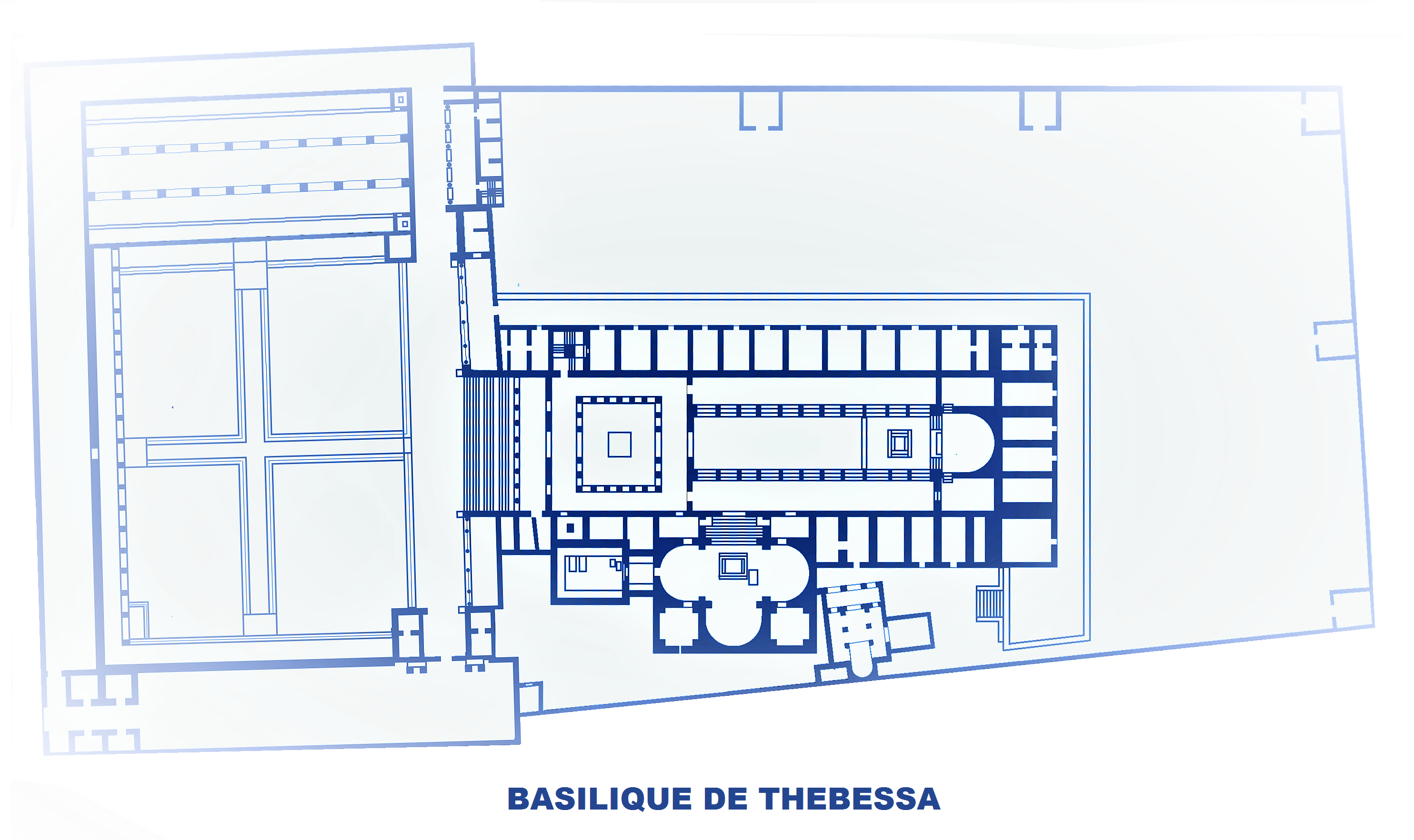 Basilique de Thébessa et ses dépendances